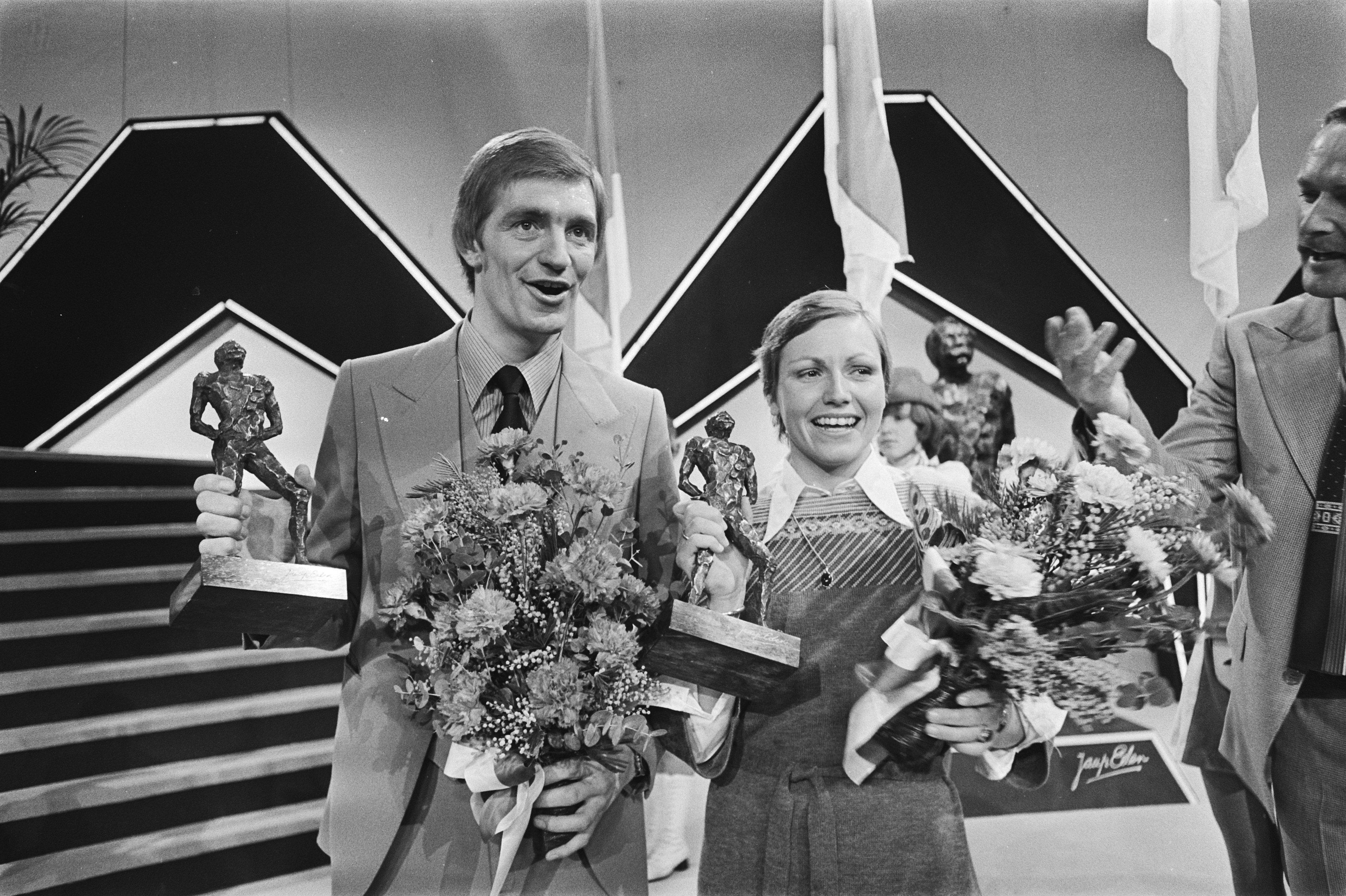 Collectie / Archief : Fotocollectie Anefo Reportage / Serie : Verkiezing sportman en sportvrouw van het jaar 1977 Beschrijving : Sportman Piet Kleine, sportvrouw Keetie van Oosten-Hage Datum : 4 januari 1977 Trefwoorden : Verkiezingen, sportmannen, sportvrouwen Persoonsnaam : Kleine, Piet, Oosten-Hage, Keetie van Fotograaf : Fotograaf Onbekend / Anefo Auteursrechthebbende : Nationaal Archief Materiaalsoort : Negatief (zwart/wit) Nummer archiefinventaris : bekijk toegang 2.24.01.05 Bestanddeelnummer : 928-9642